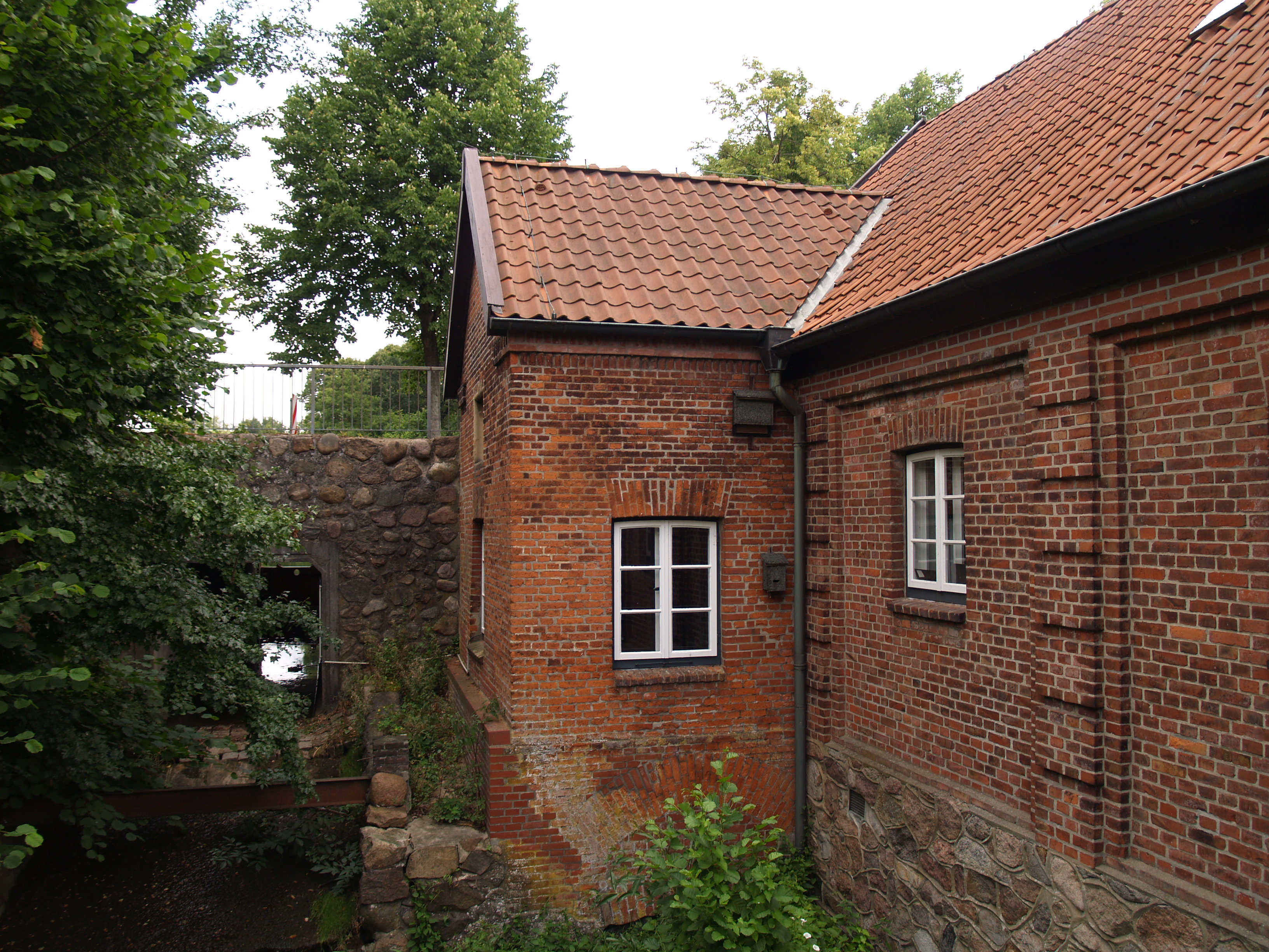 Kupfermühle in Glinde, Kreis Stormarn, Deutschland